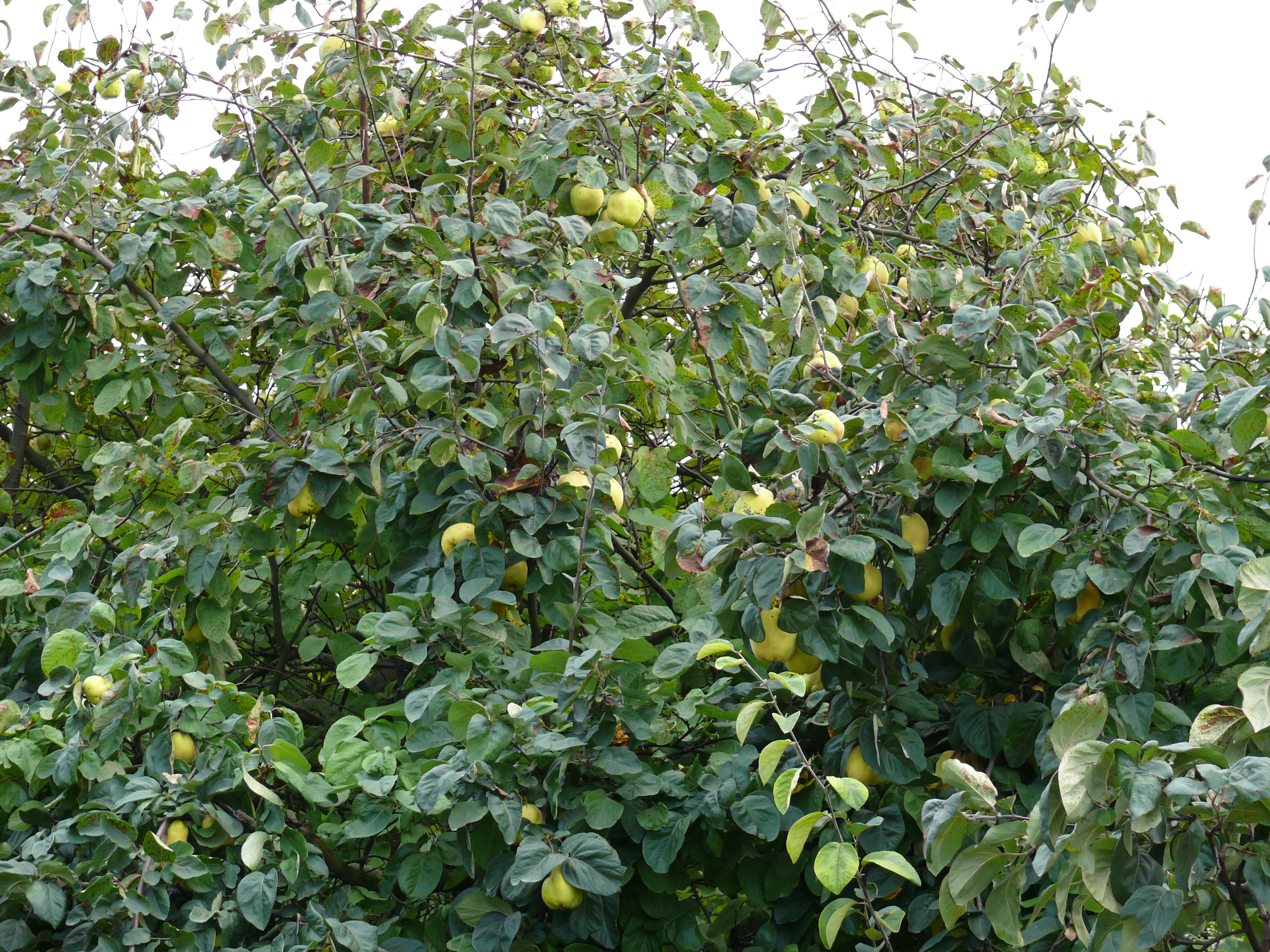 Qittenbaum (Cydonia oblonga)